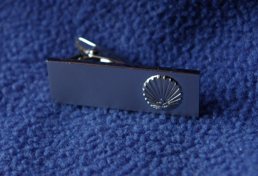 2009年4月、福岡県において自身で撮影